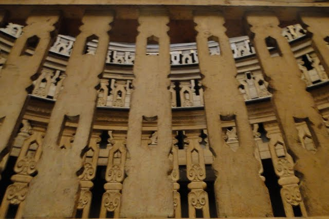 Палаццо дель Бо